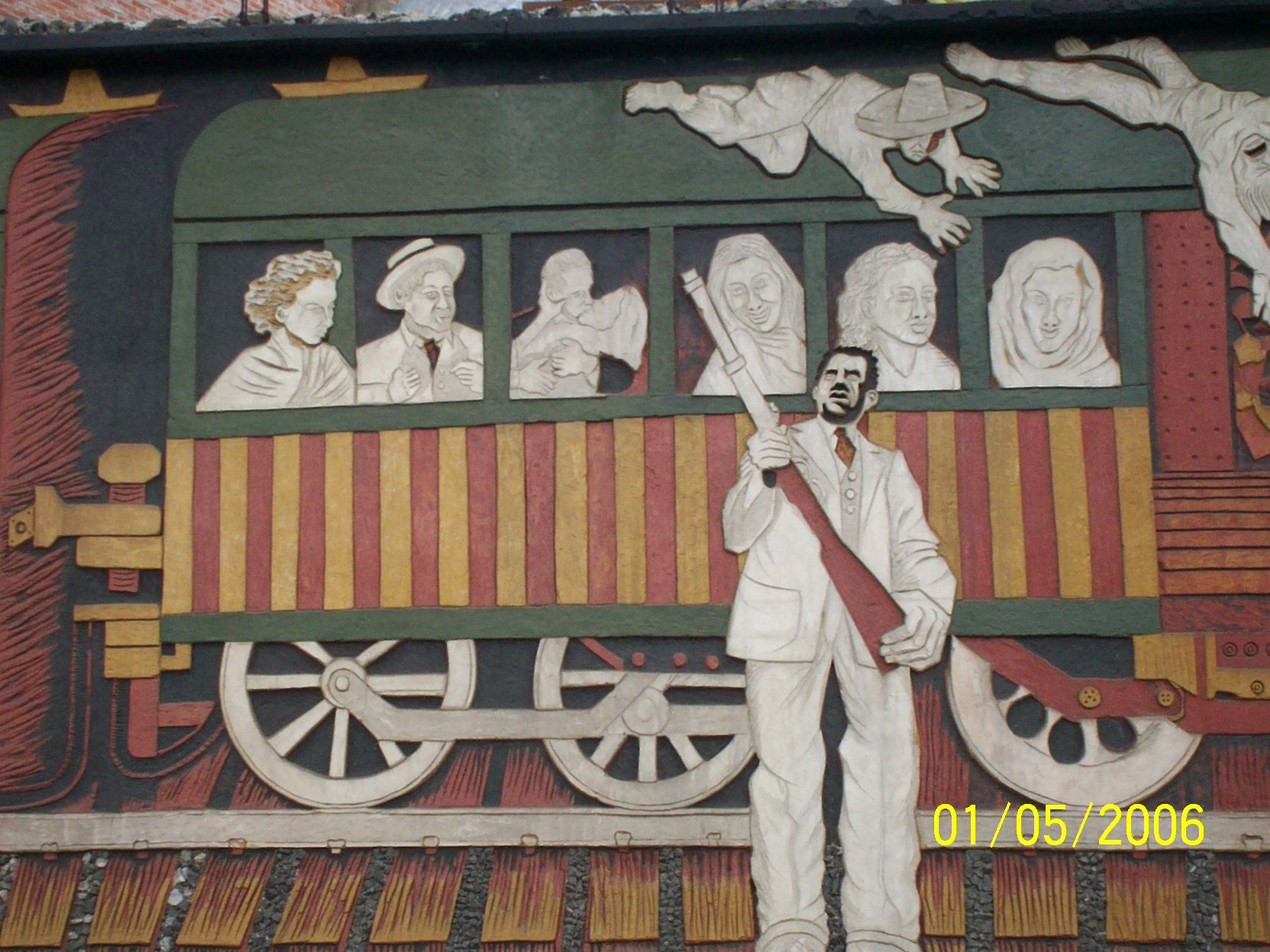 Detalle del Mural "El Viaje del Siglo XX", mostrando a Lazaro Cardenas